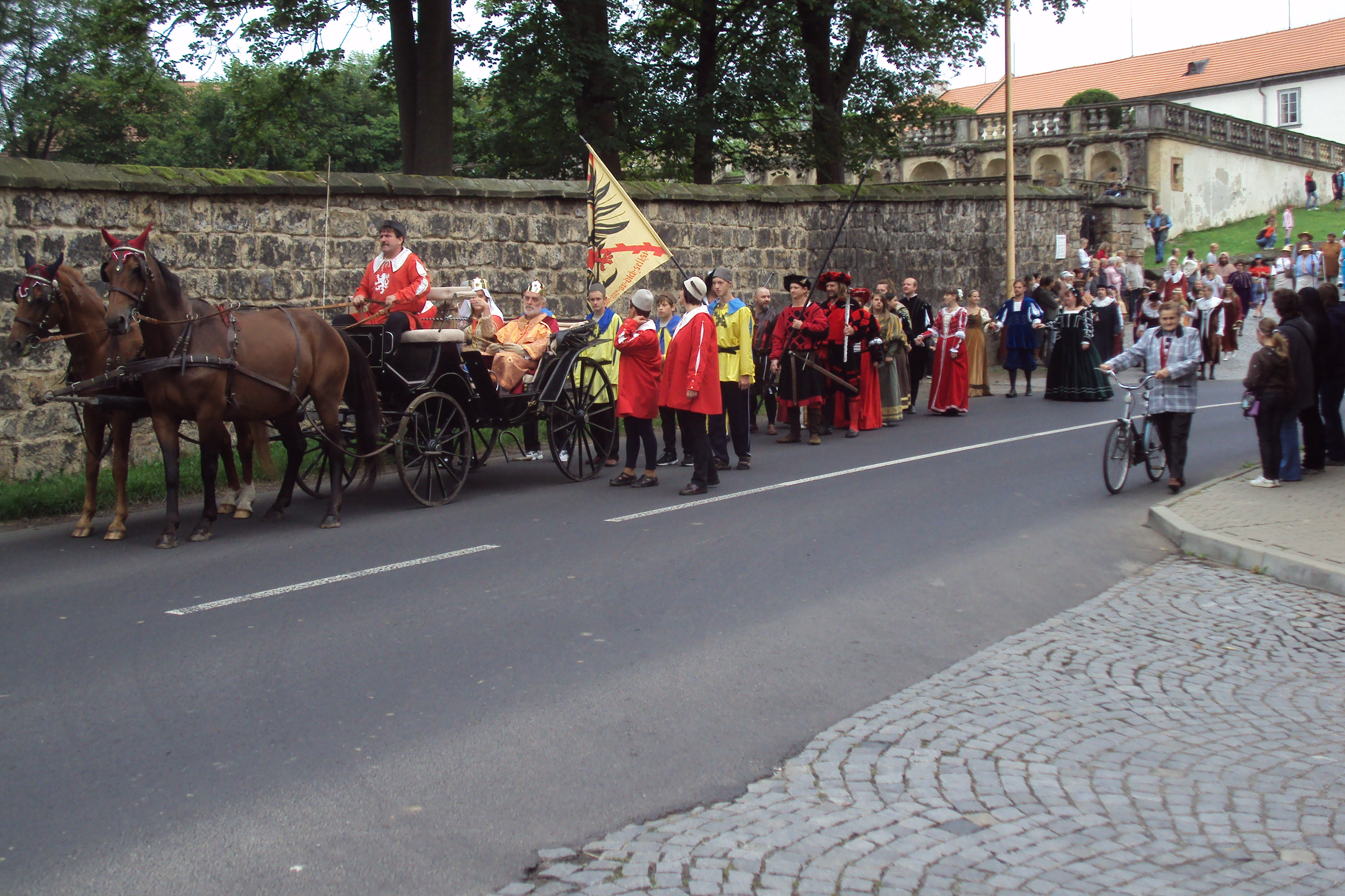 Průvod od zámku při slavnostech